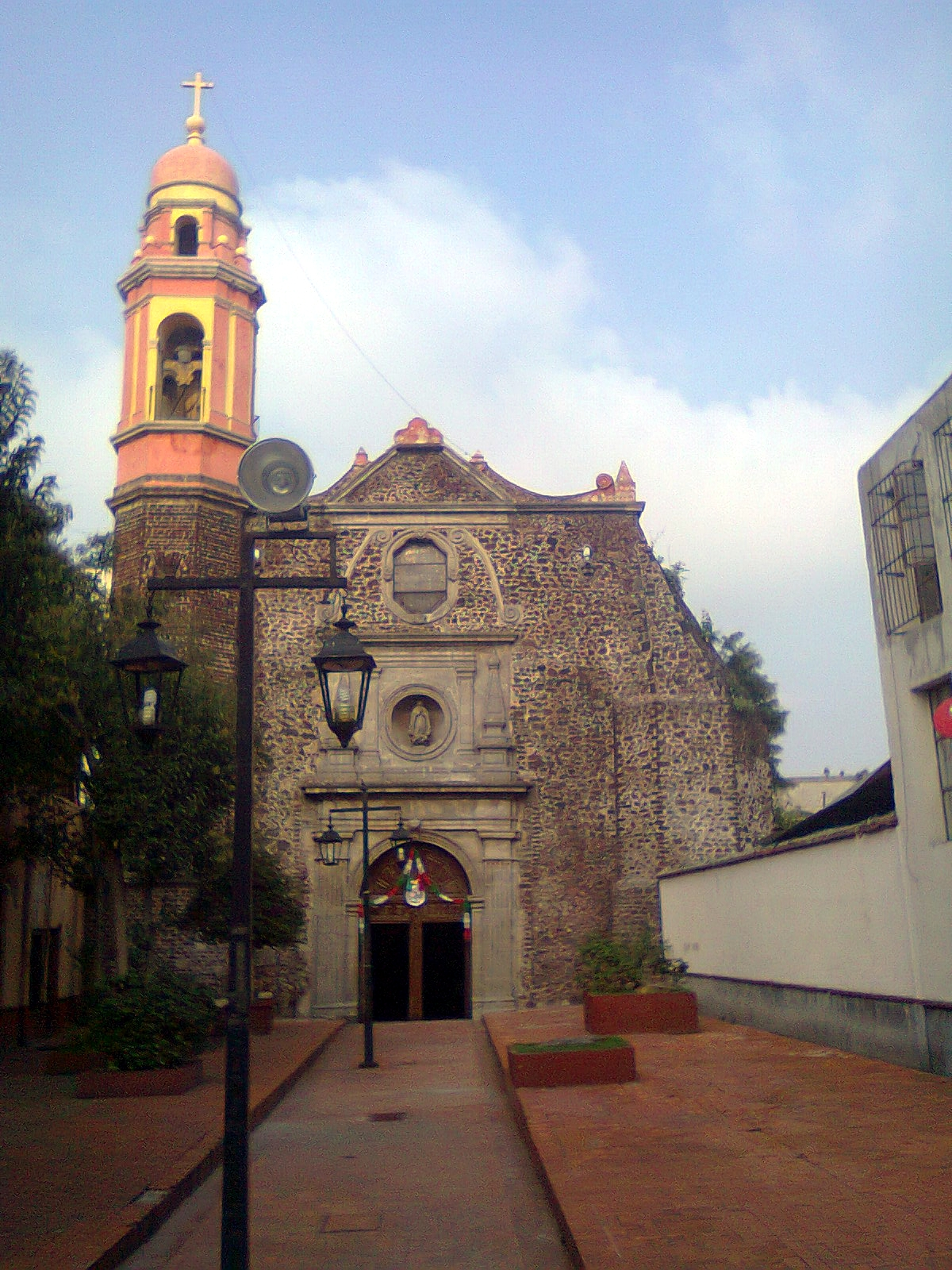 Enfrente del corazón de Garibaldi, en San Camilito entre pequeñas calles esta una plaza que tiene una iglesia. Su tamaño le permite llegar hasta el Paseo de la Reforma. Los mariachis son sus visitantes.